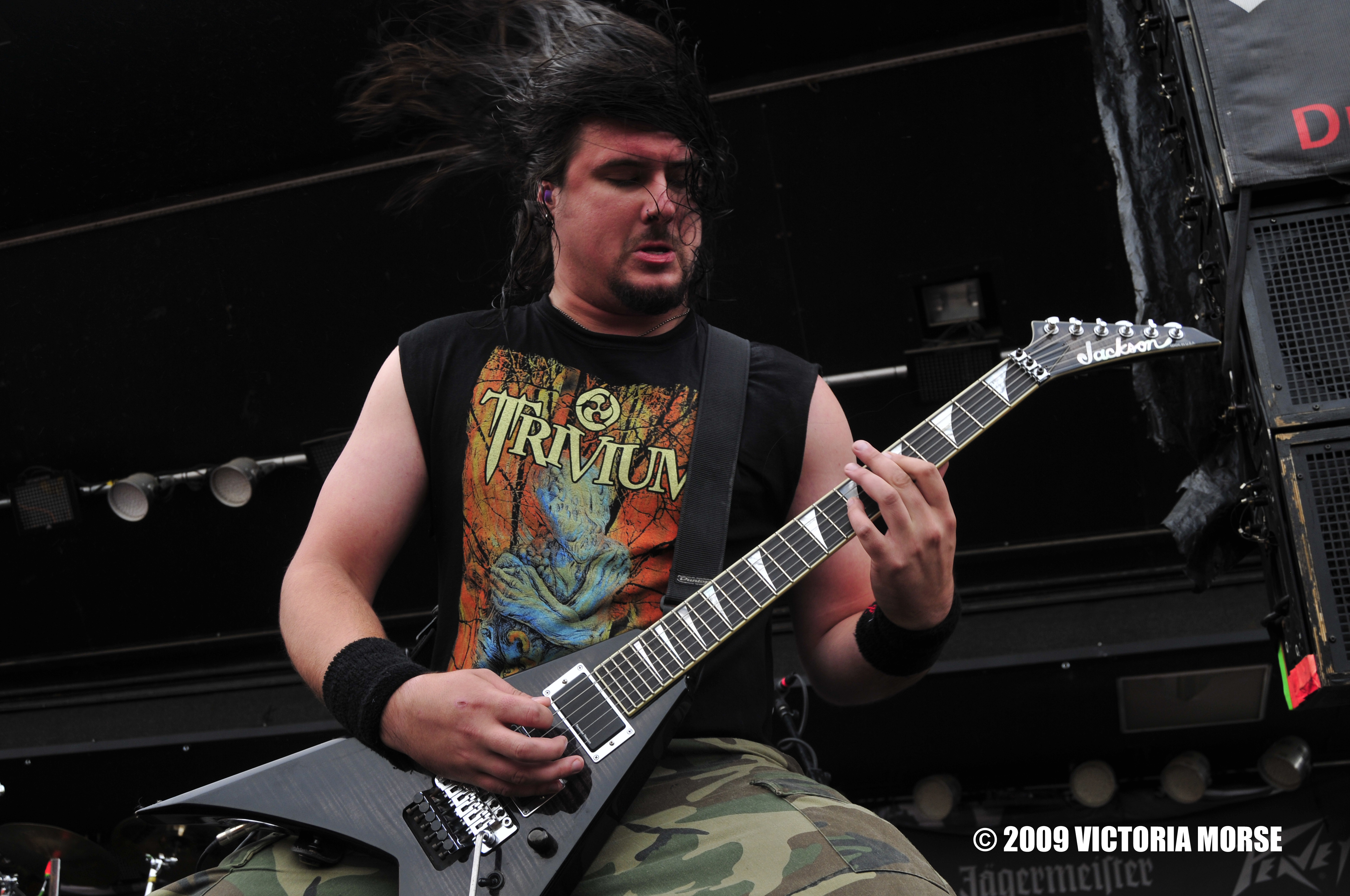 I bad looking